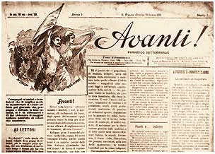 1ª edição da folha socialista Avanti!, publicada em São Paulo, de 1900 até 1919, com interrupções.